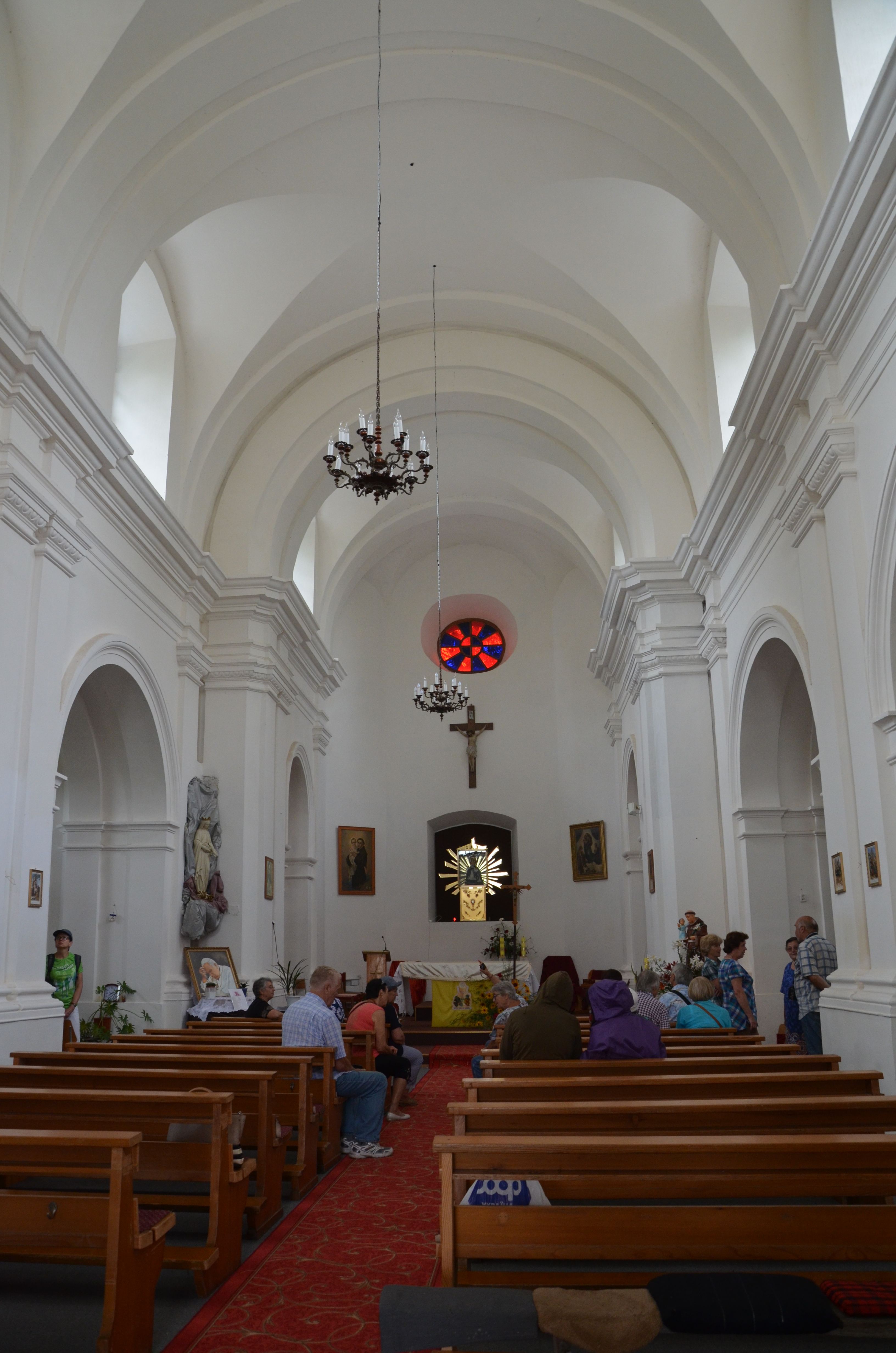 Костел Св.Антонія Падуанського (мур.), Стара Котельня